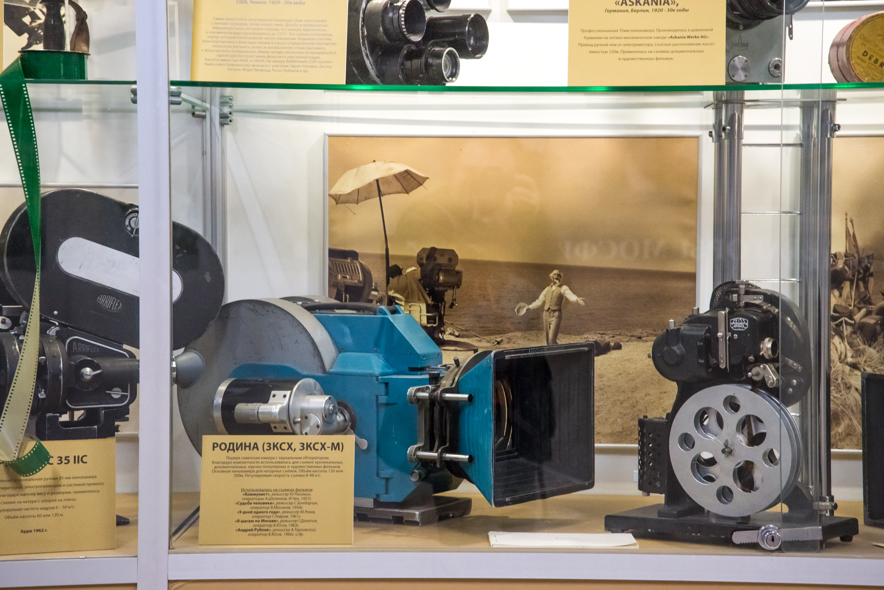 Кинокамера Родина ЗКСХ в музее Мосфильма. Использовалась для съёмок фильмов "Судьба человека", "9 дней одного года", "Андрей Рублёв", "Я шагаю по Москве"